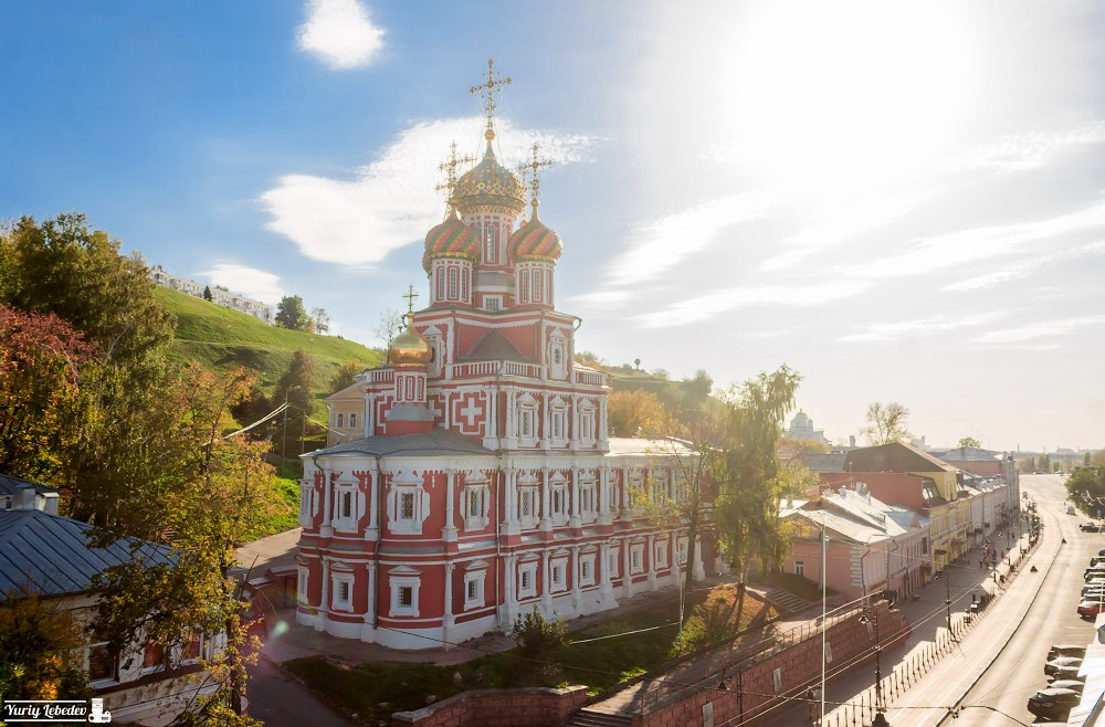 Строгановская (Рождественская) церковь